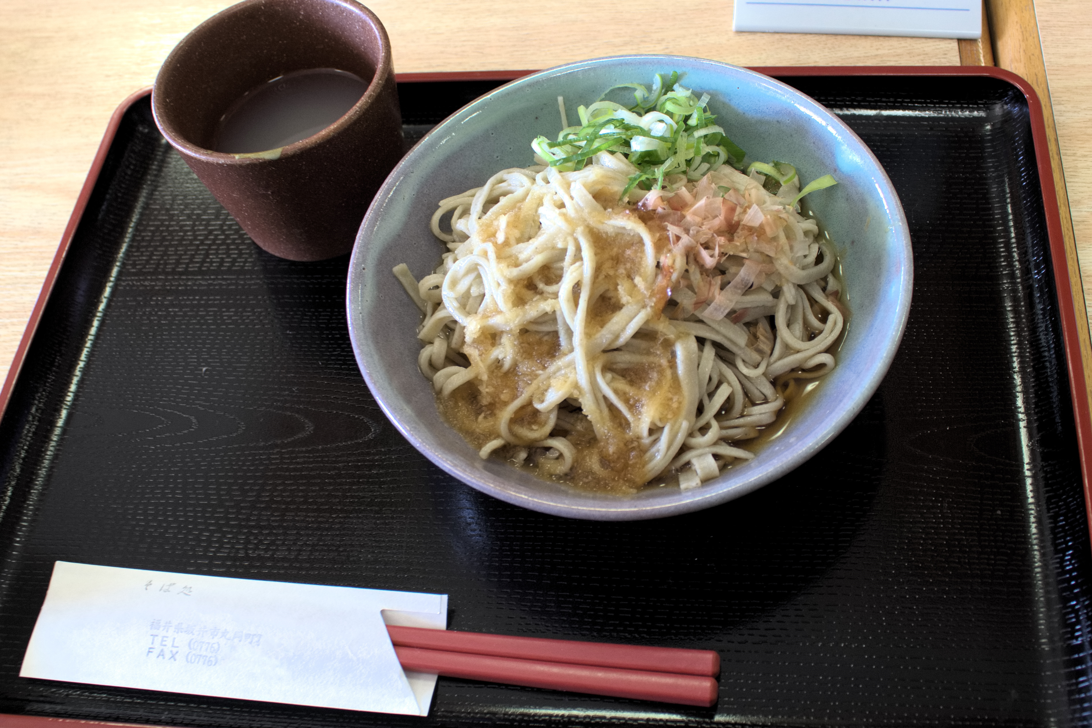 そば打ち体験で打ったそばで調理したおろし蕎麦